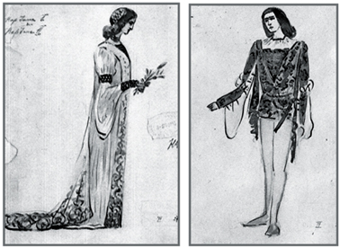 В. Бушина. Эскизы костюмов Франчески и Паоло к первой постановке. Большой театр. 1906